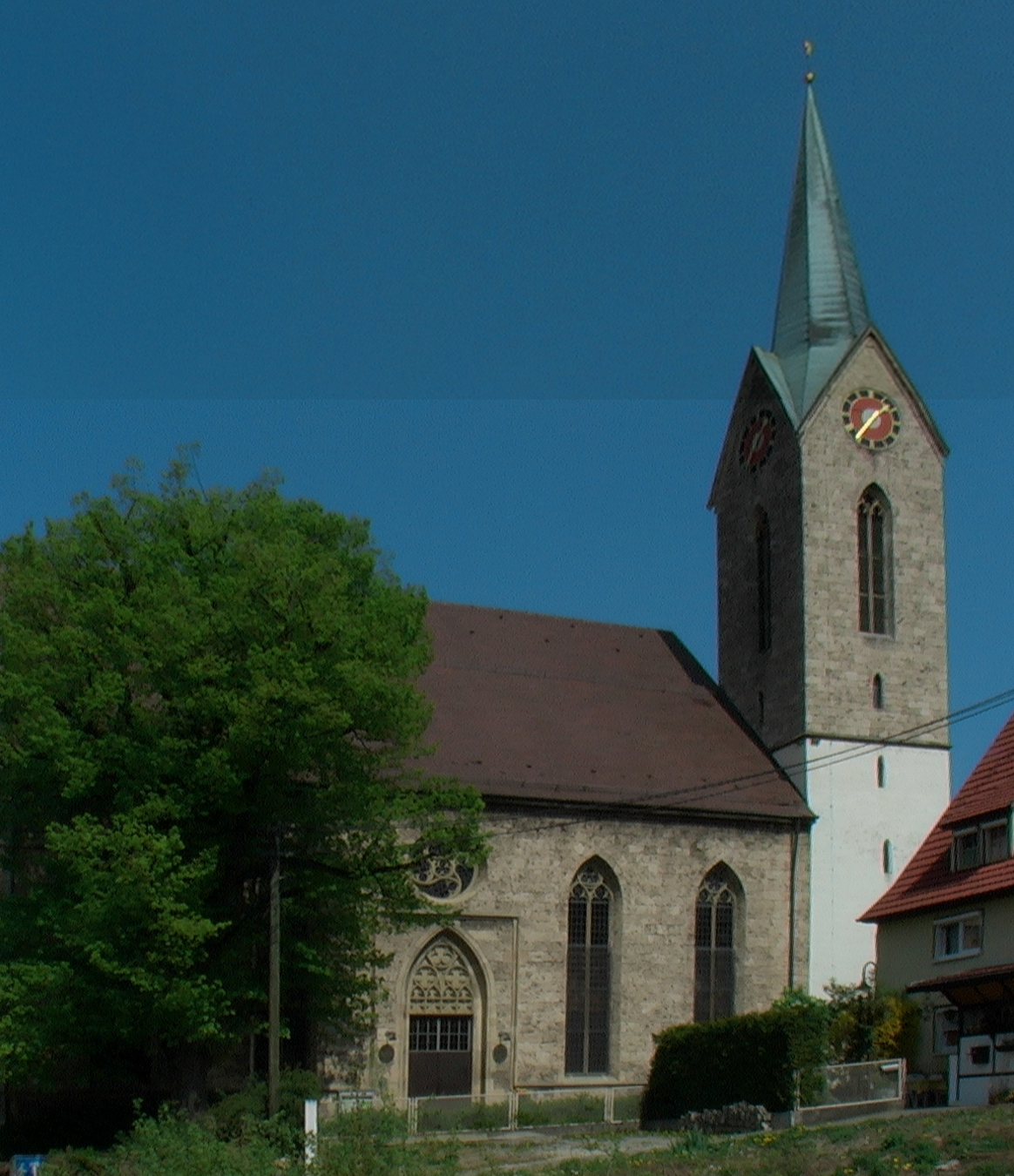 Die evangelische Kirche St. Peter und Paul in Gönningen bei Reutlingen ist ein hochromanischer Bau aus dem 12 . Jahrhundert. Die schmalen Fenster des Turms wurden als wehrhafte Schießscharten angelegt